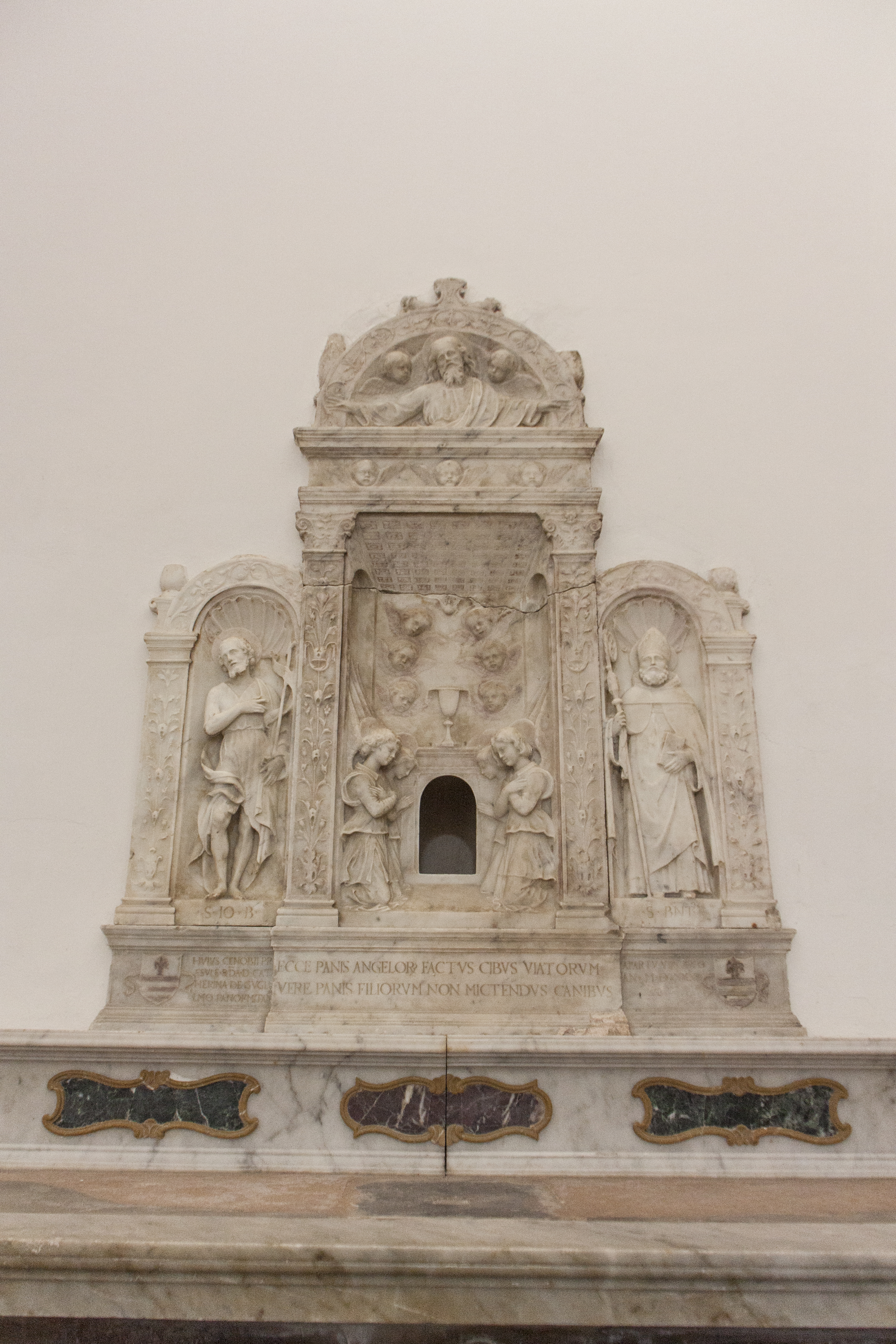 Ciborio Cattedrale di Mazara